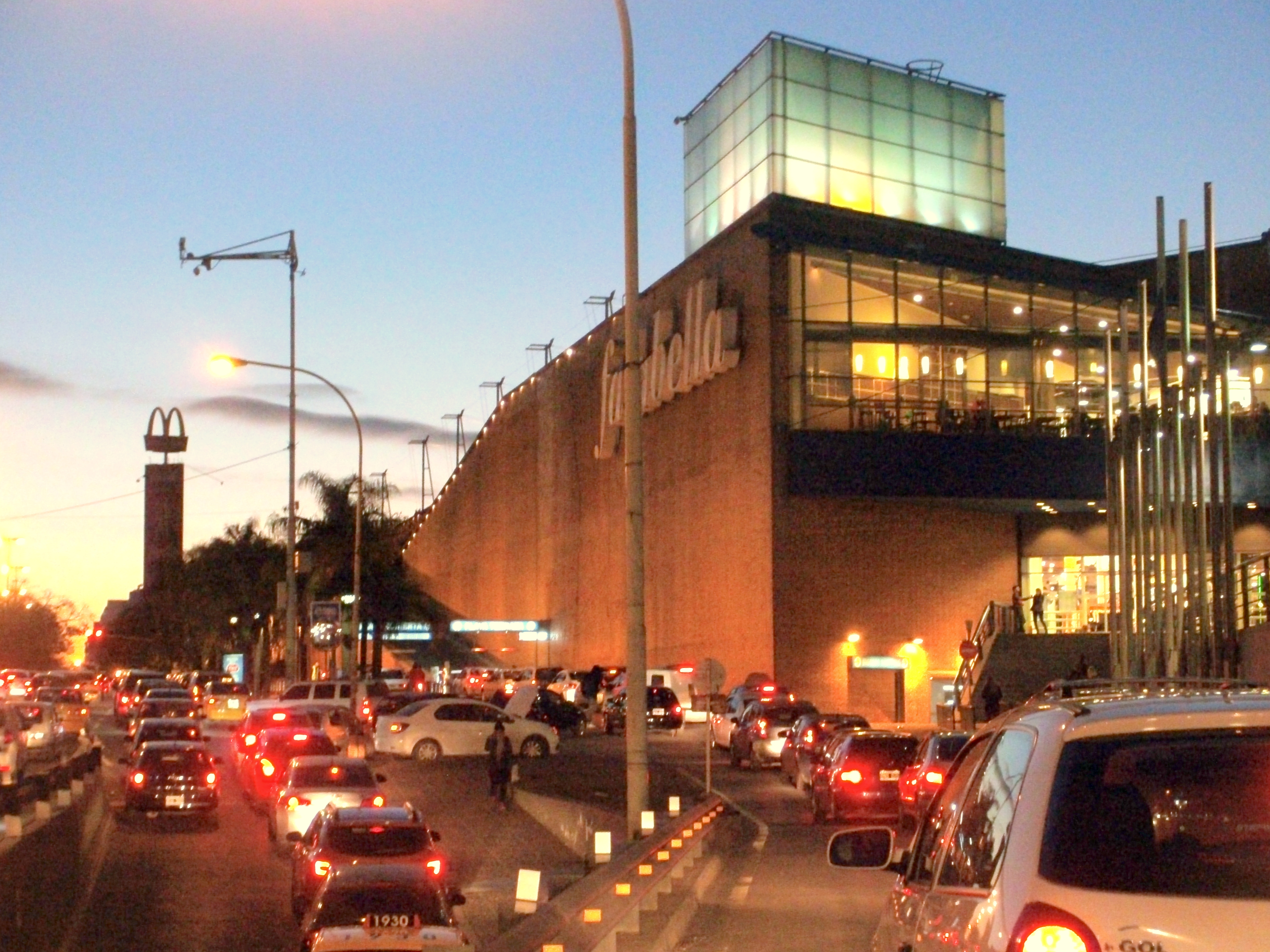 En el sector este del centro comercial Nuevocentro de la ciudad de Córdoba en Argentina está tiendas Falabella